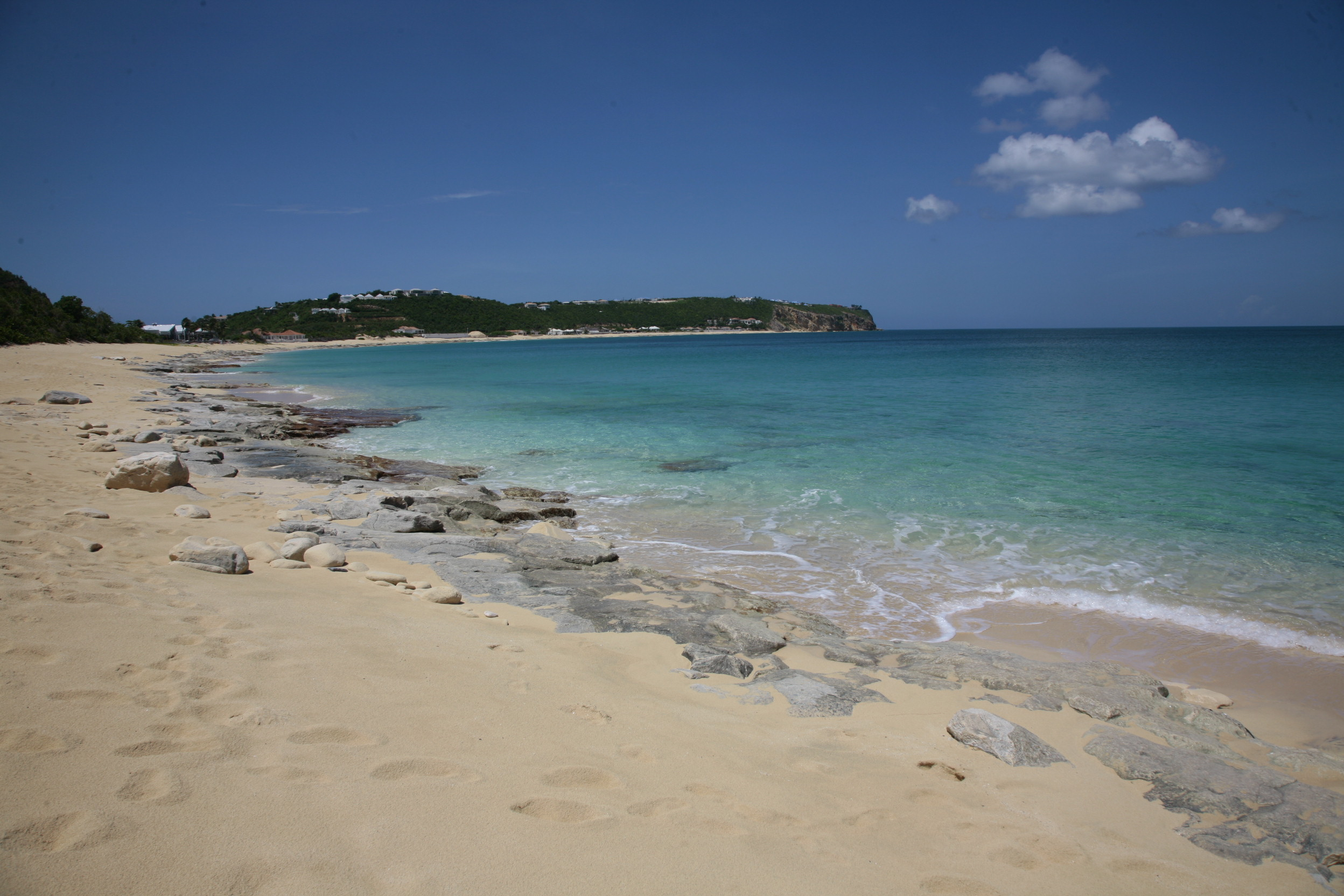 Plage de Baie Rouge Saint-Martin